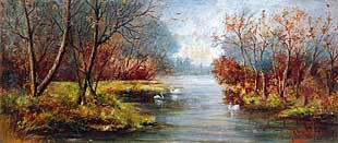 Landscape